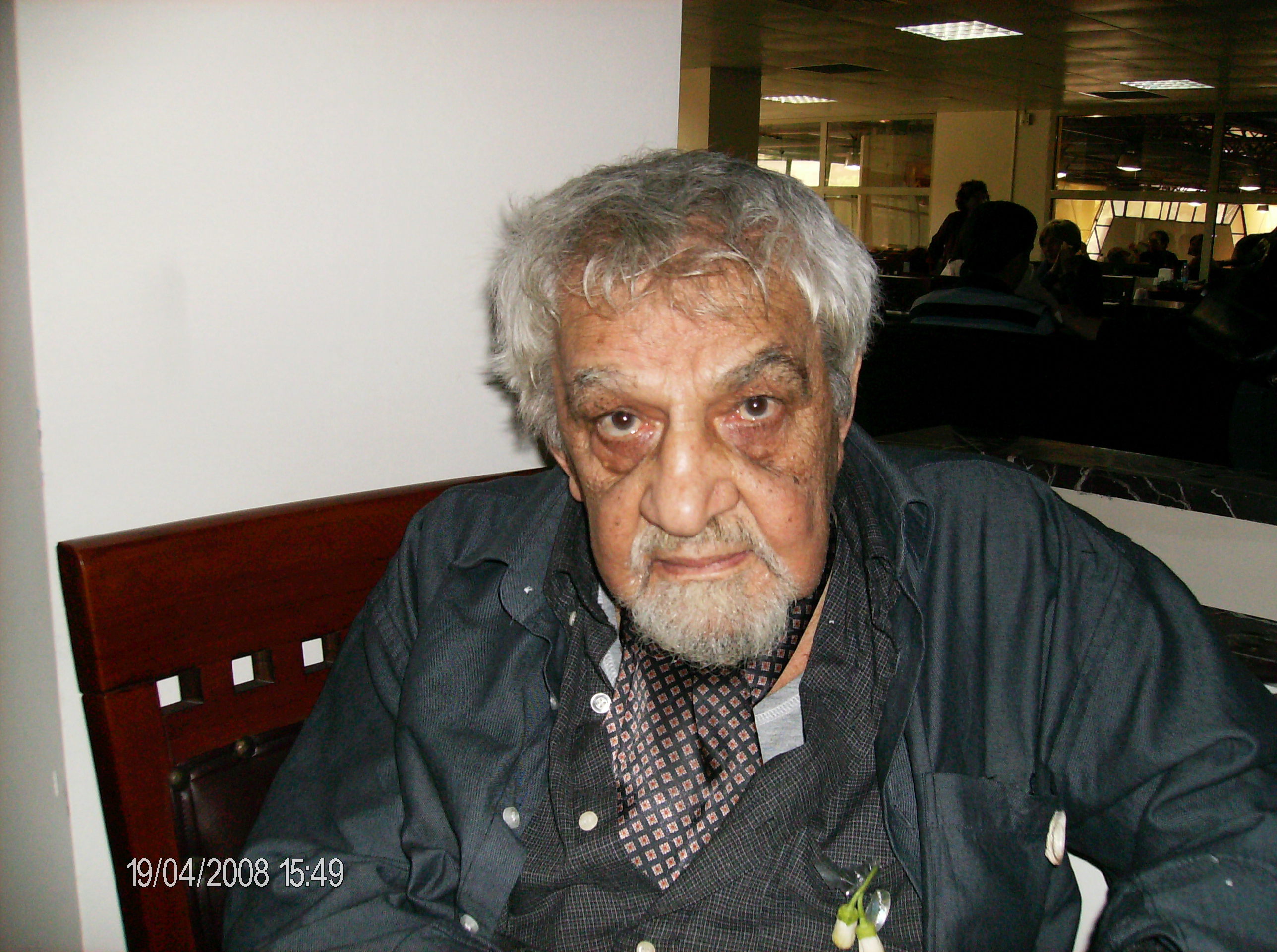 kendi çekimim 13. izmir kitap fuarı